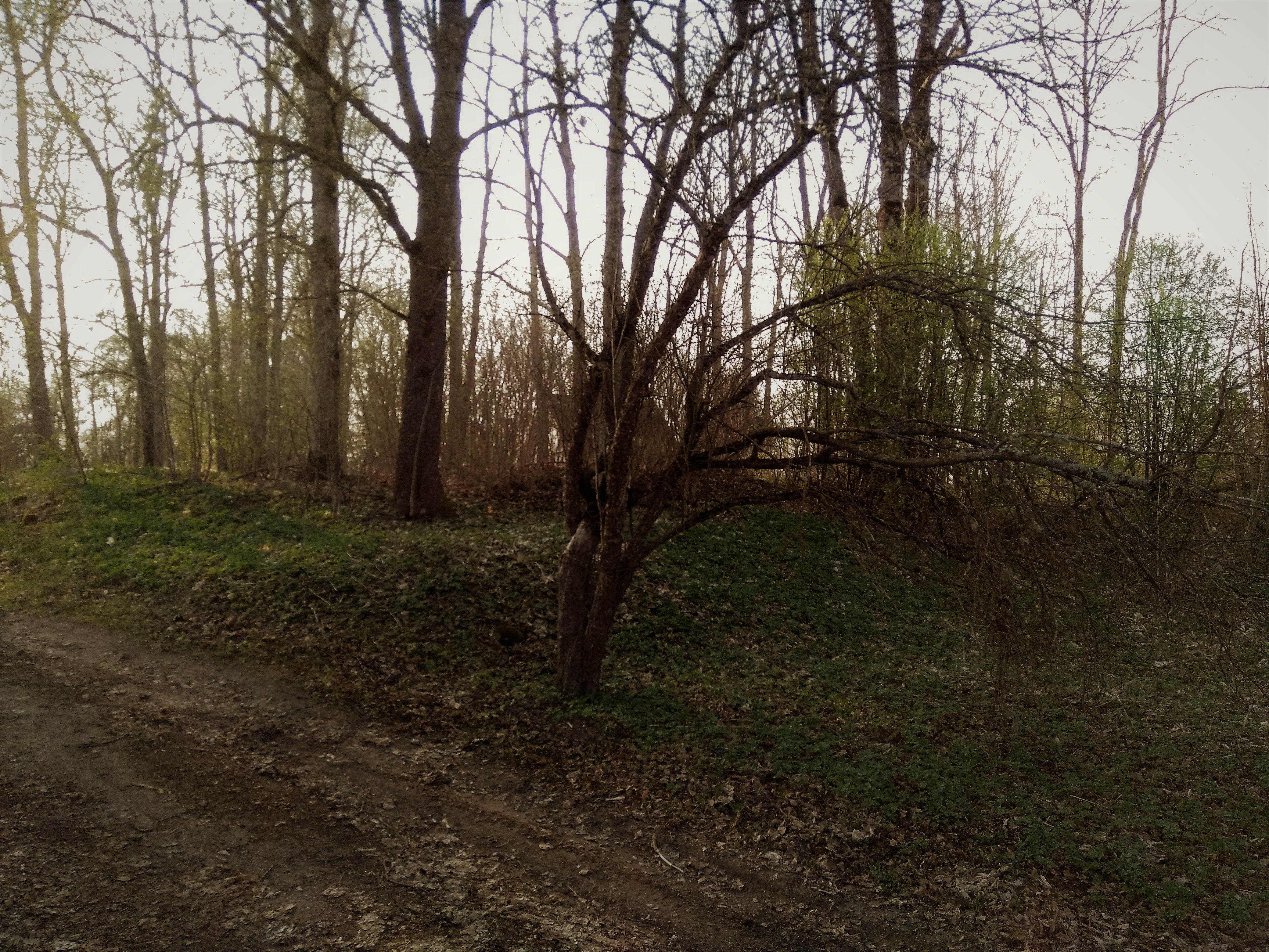 Vaade hilisema mõisa hoovis paiknevale kunagise torn- või majalinnuse asukohale kagusuunast.